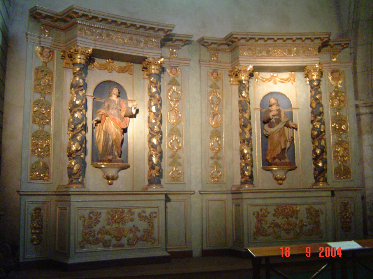 Retable de l’ancienne chapelle de la congrégation des messieurs (1692) aujourd’hui à l'église Notre-Dame-de-Cougnes de La Rochelle